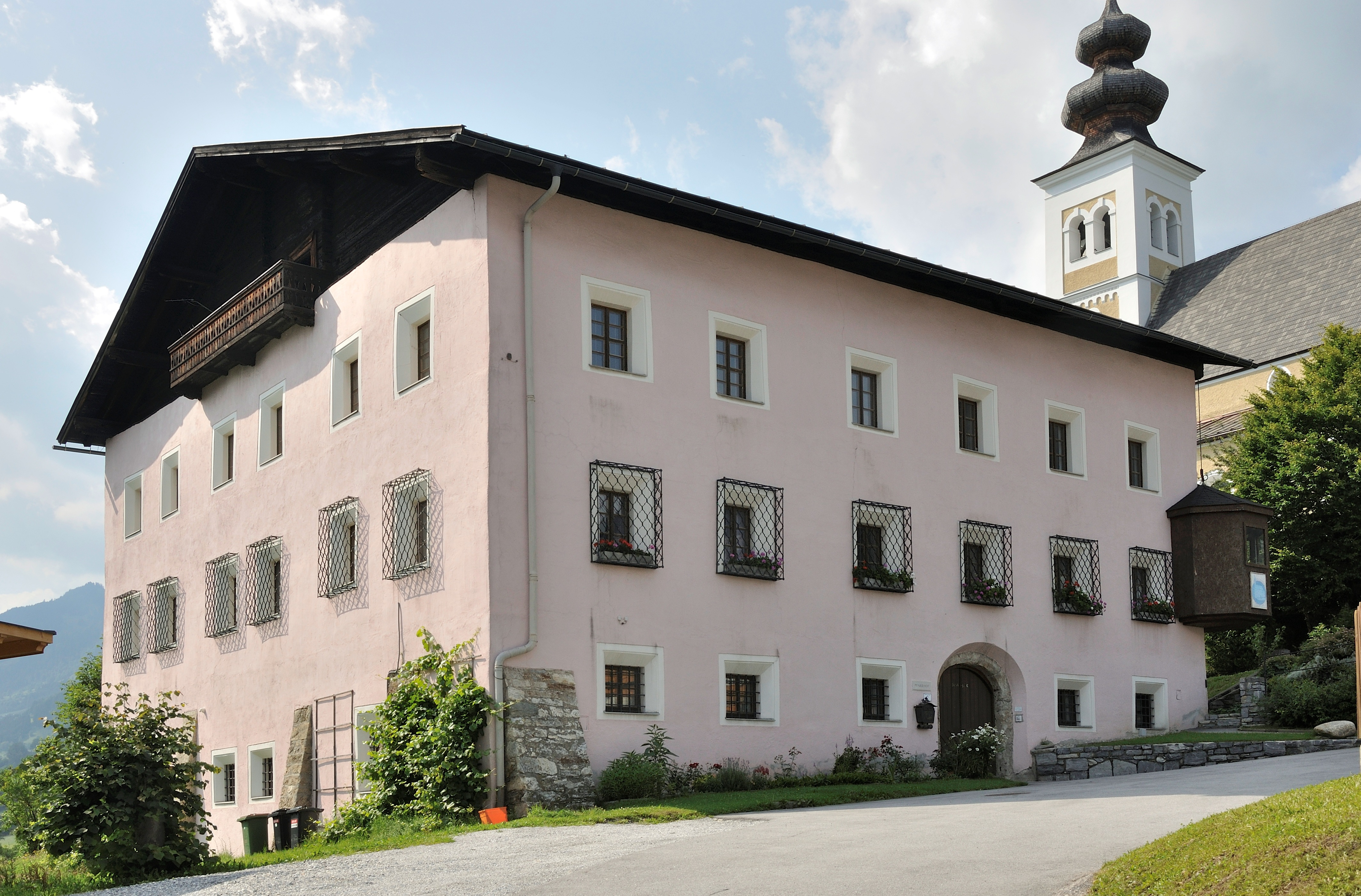 Pfarrhof